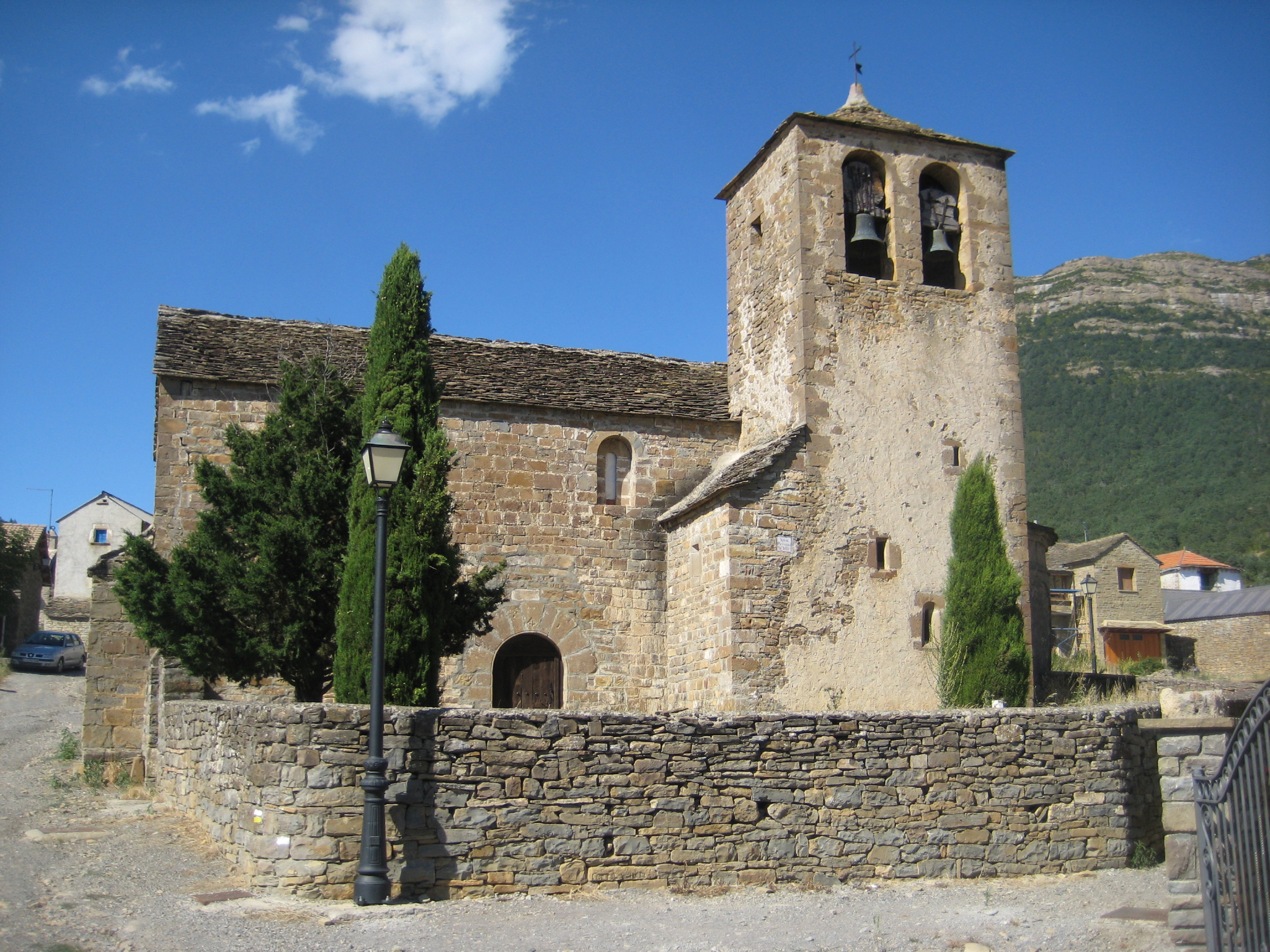 Se trata de una iglesia construida en dos fases claramente diferenciadas. La primera corresponde al ábside, de finales del s.XI y adscrita a la tipología del llamado “círculo larredense” dentro de las Iglesias del Serrablo, mientras que la segunda corresponde a la nave, del s.XII y fue construida siguiendo el estilo románico jaqués. Consta de nave única cubierta con techumbre de madera, presbiterio atrofiado y ábside semicircular peraltado, cubierto con bóveda de horno reconstruida tras perderse la original durante la Guerra Civil. Además cuenta con una torre de planta cuadrada adosada al lado meridional en el s.XV. La decoración se concentra en la parte alta del ábside y consiste en un friso de baquetones y una banda de arquillos ciegos sobre lesenas. Además existen restos de una imposta en ajedrezado jaqués, correspondiente a la segunda fase, en los muros de la nave.